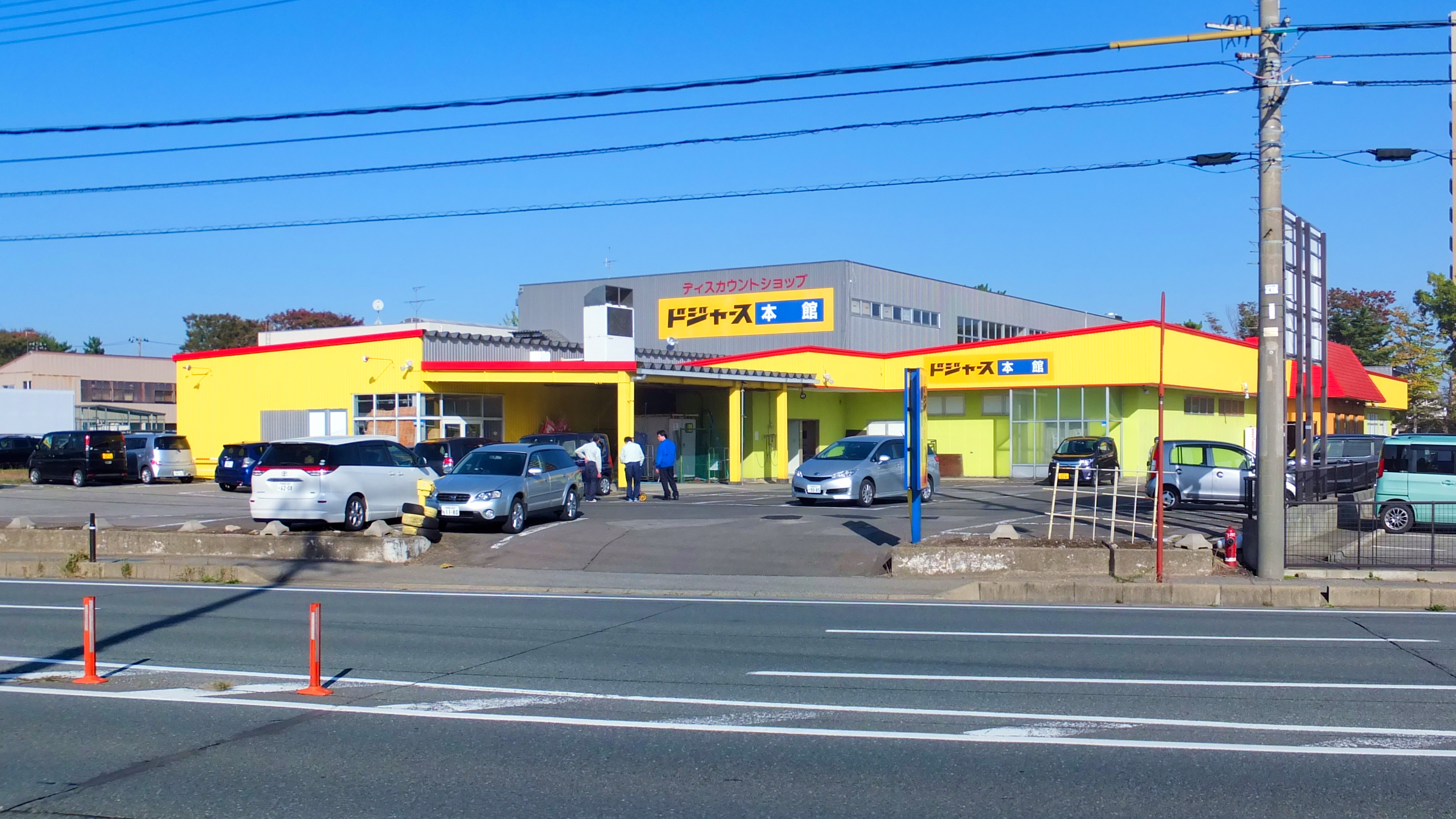 ドジャース本館（秋田市山王臨海町）